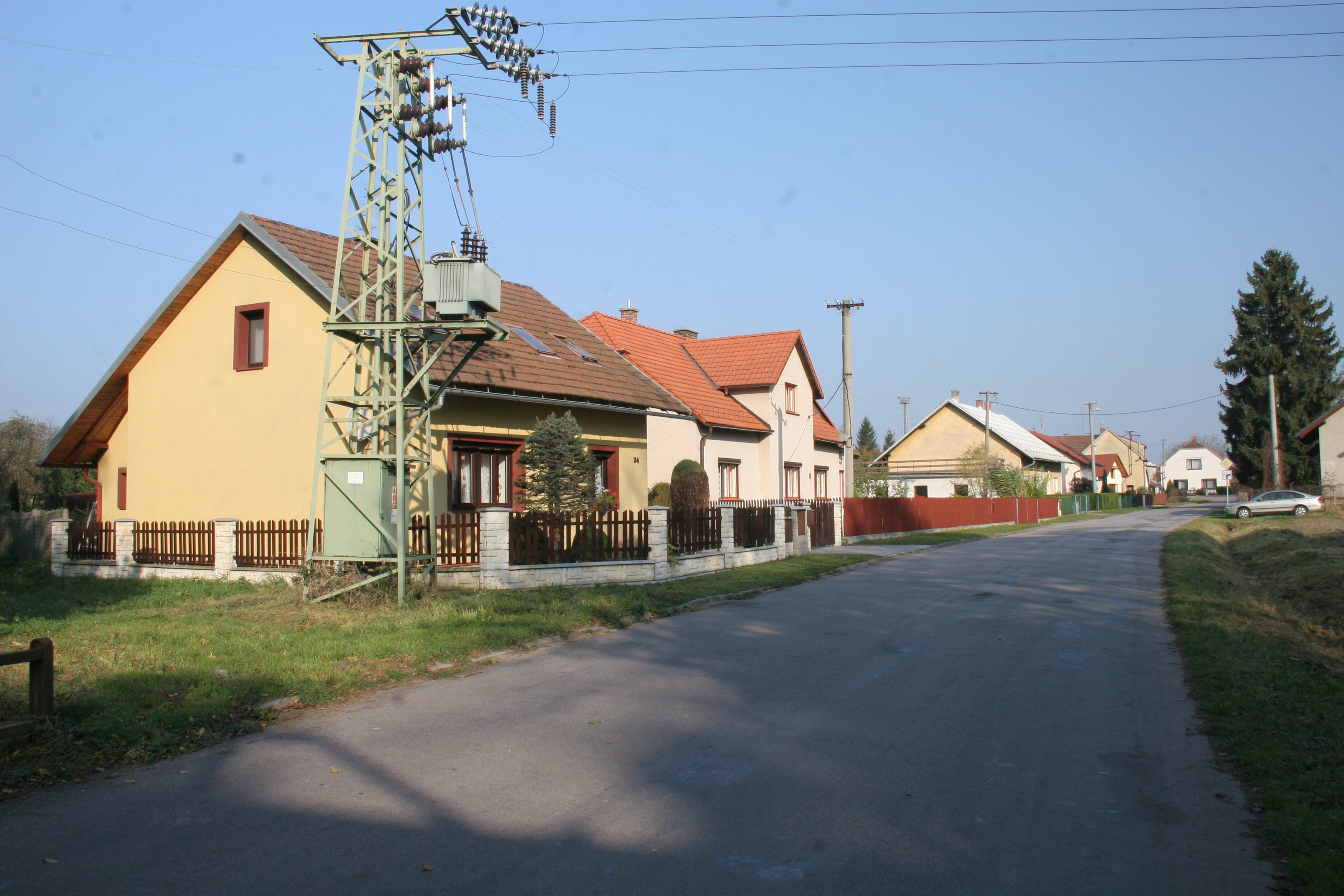 Janovičky čp. 34